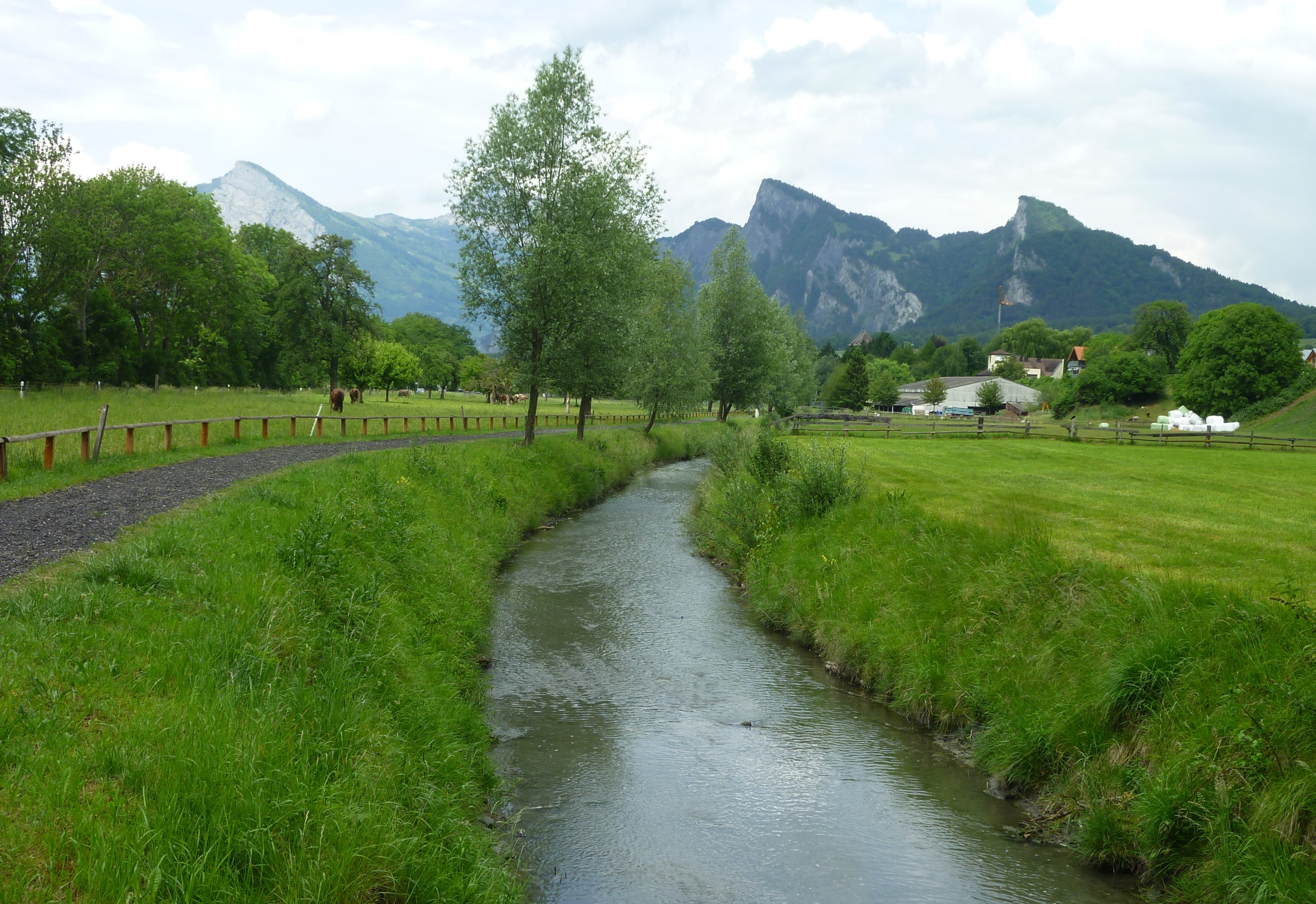 Mühlbach Richtung Maienfeld